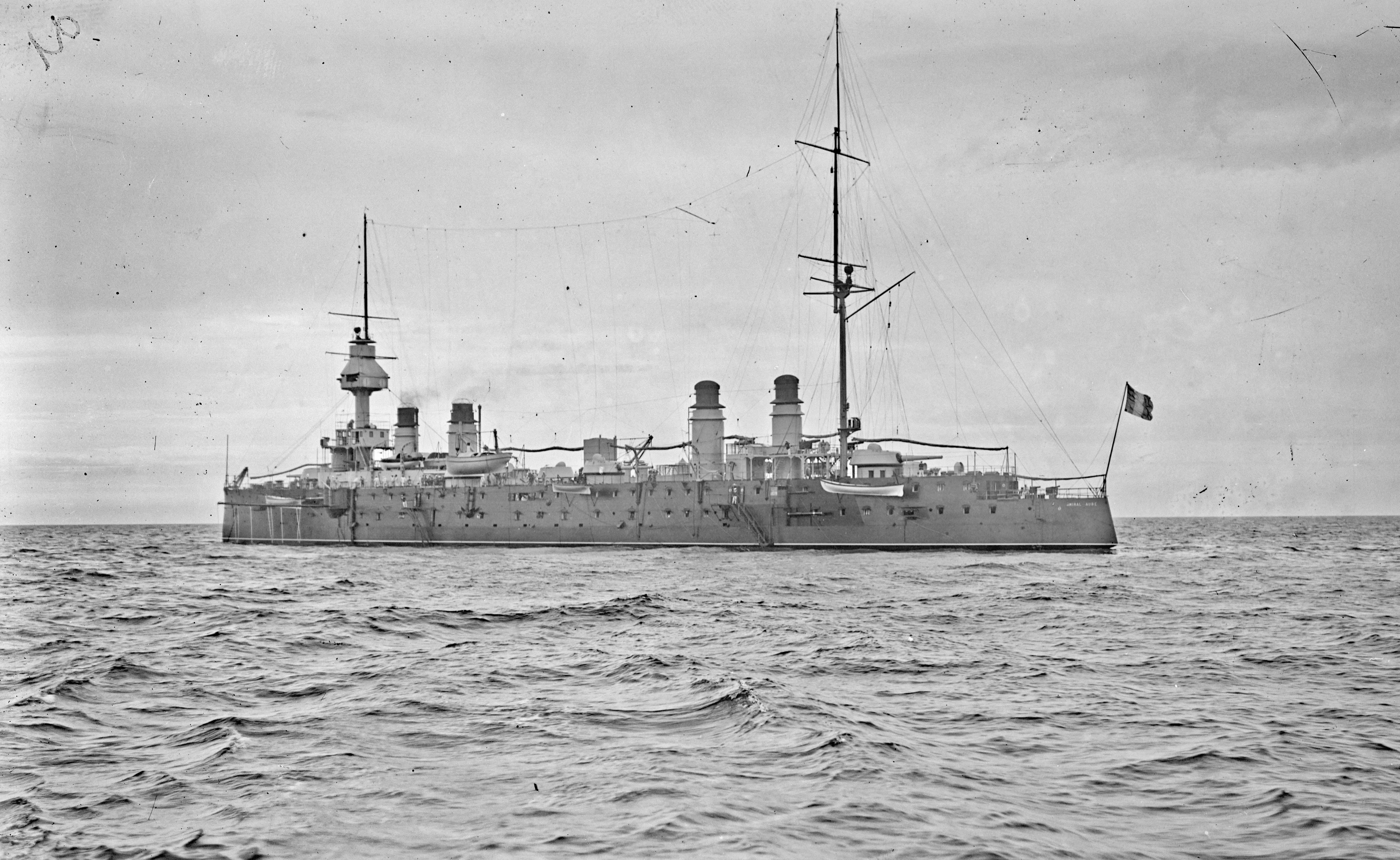 Visite de l'escadre anglaise, le 10 juillet 1905 : Amiral Aube à la sortie de la rade de Brest.